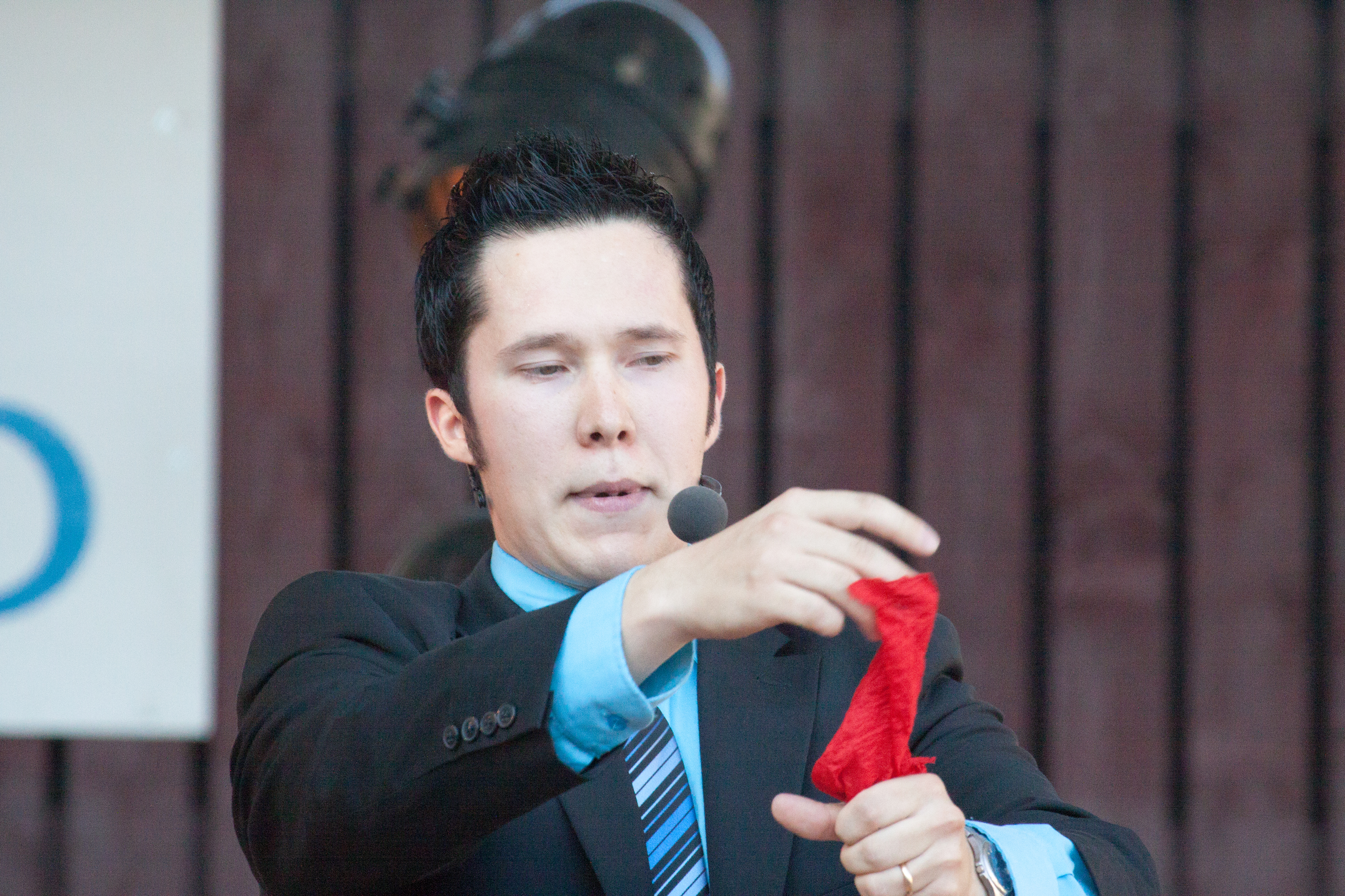 Aaro Sorva suomalainen taikuri